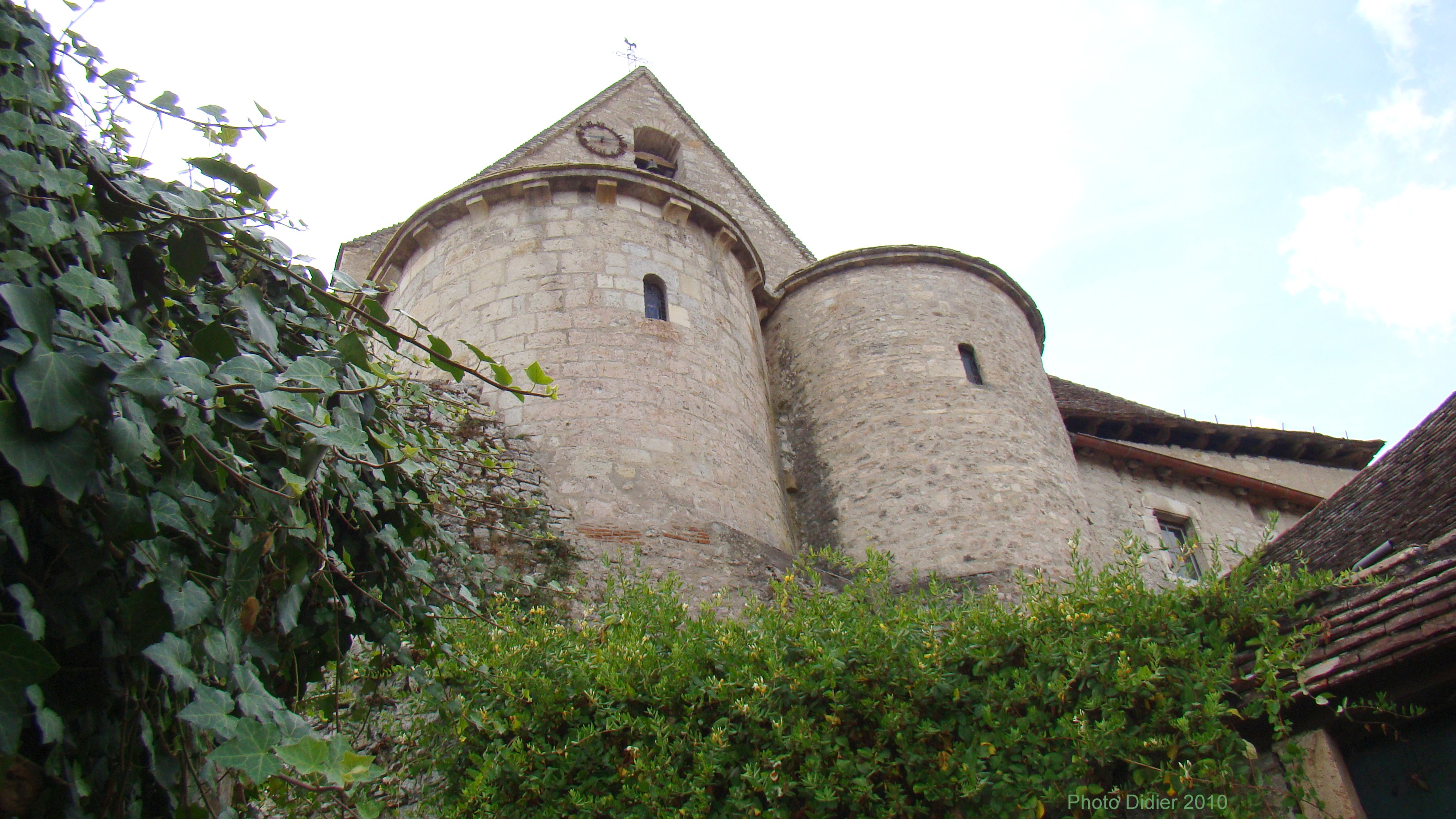 Abside double de l'église de Creysse (Lot).